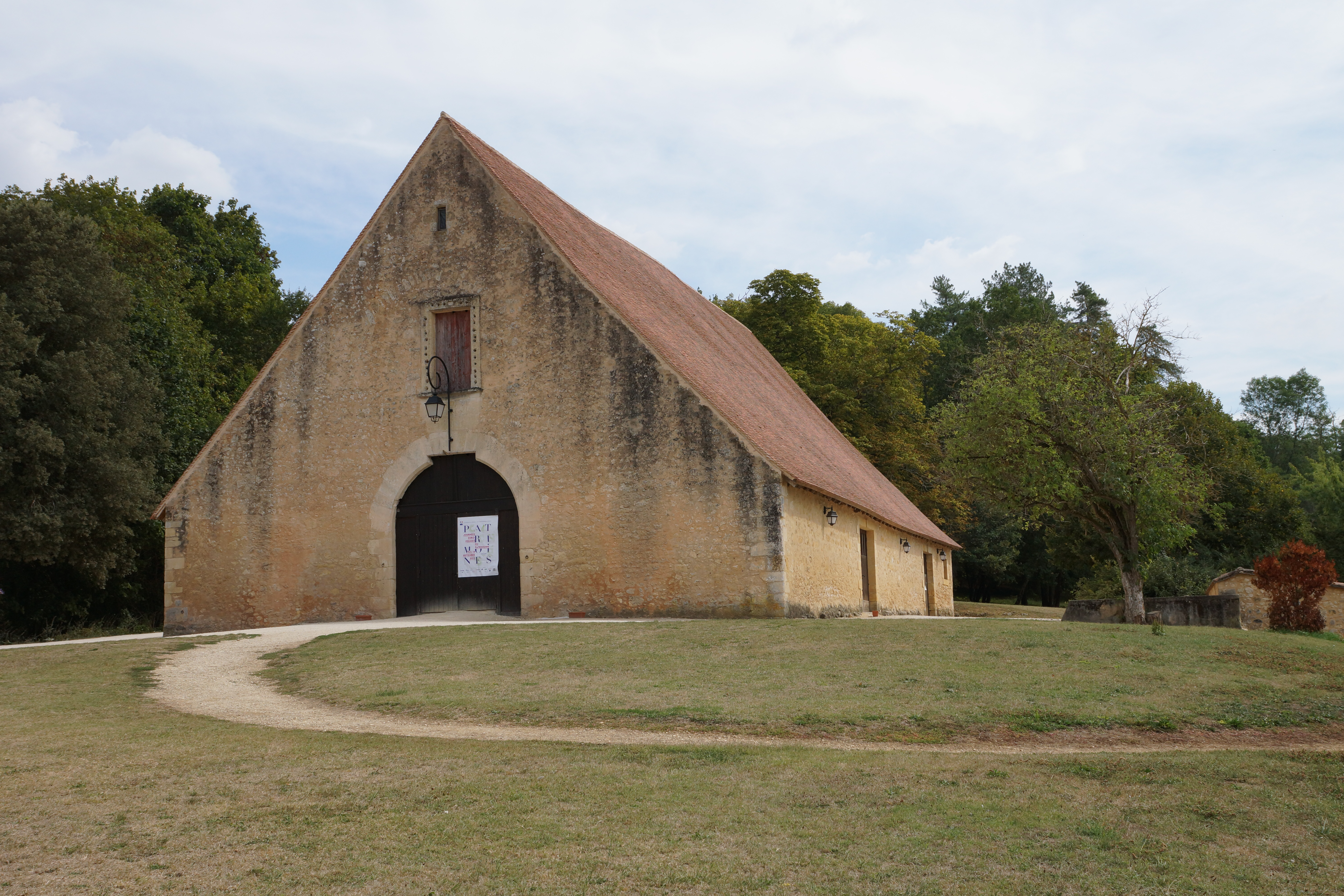 Grange de Lanquais, (Inscription, 1942) .